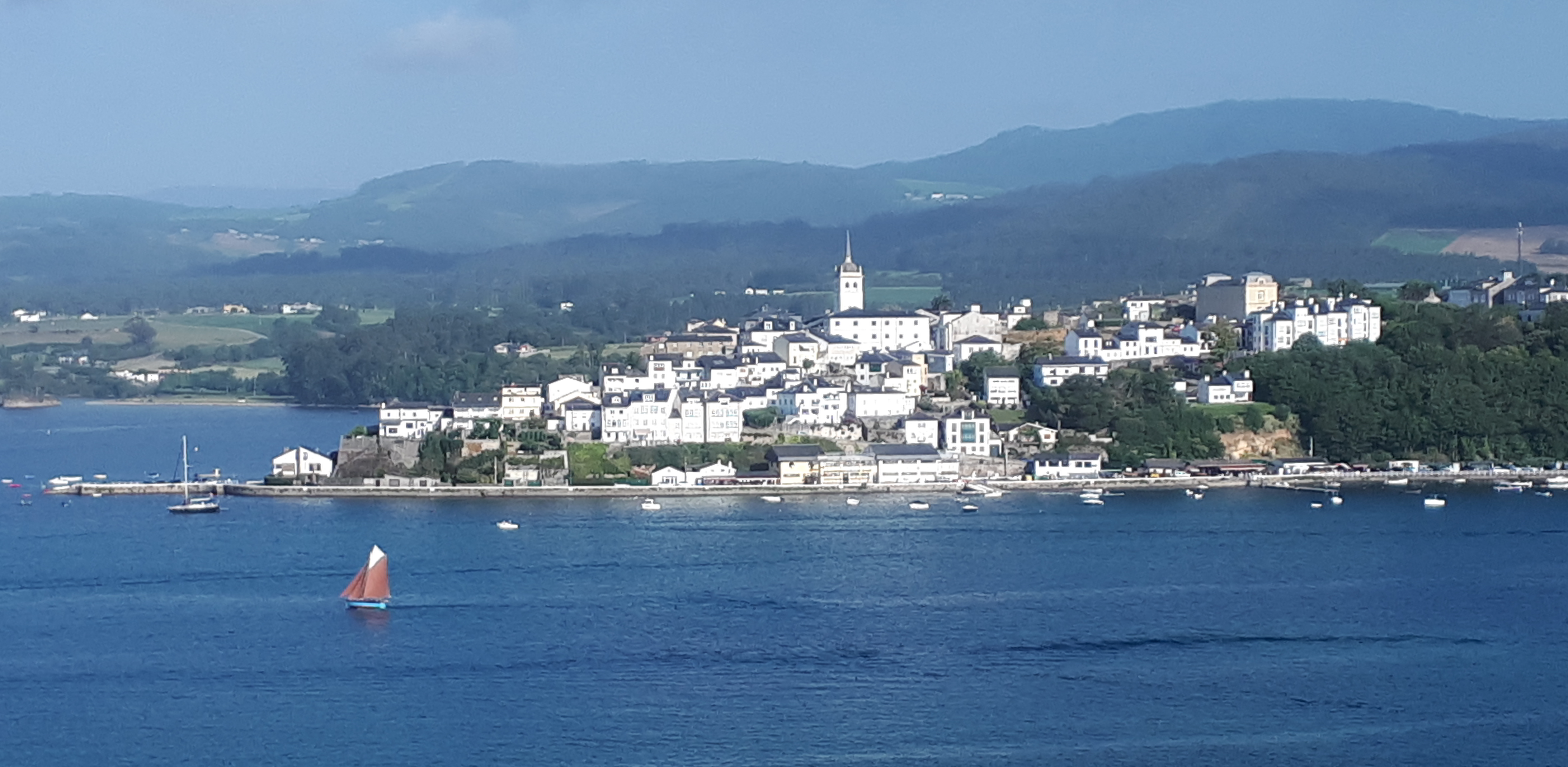 Castropol y la Ría de Eo (Asturias) vistas desde Ribadeo (Galicia). This is a photography of a Special Area of Conservation in Spain with the ID: ES1200016. Natura2000 entry, EEA entry